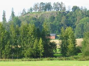 Hakoinen's bourg and hillcastel in Janakkala